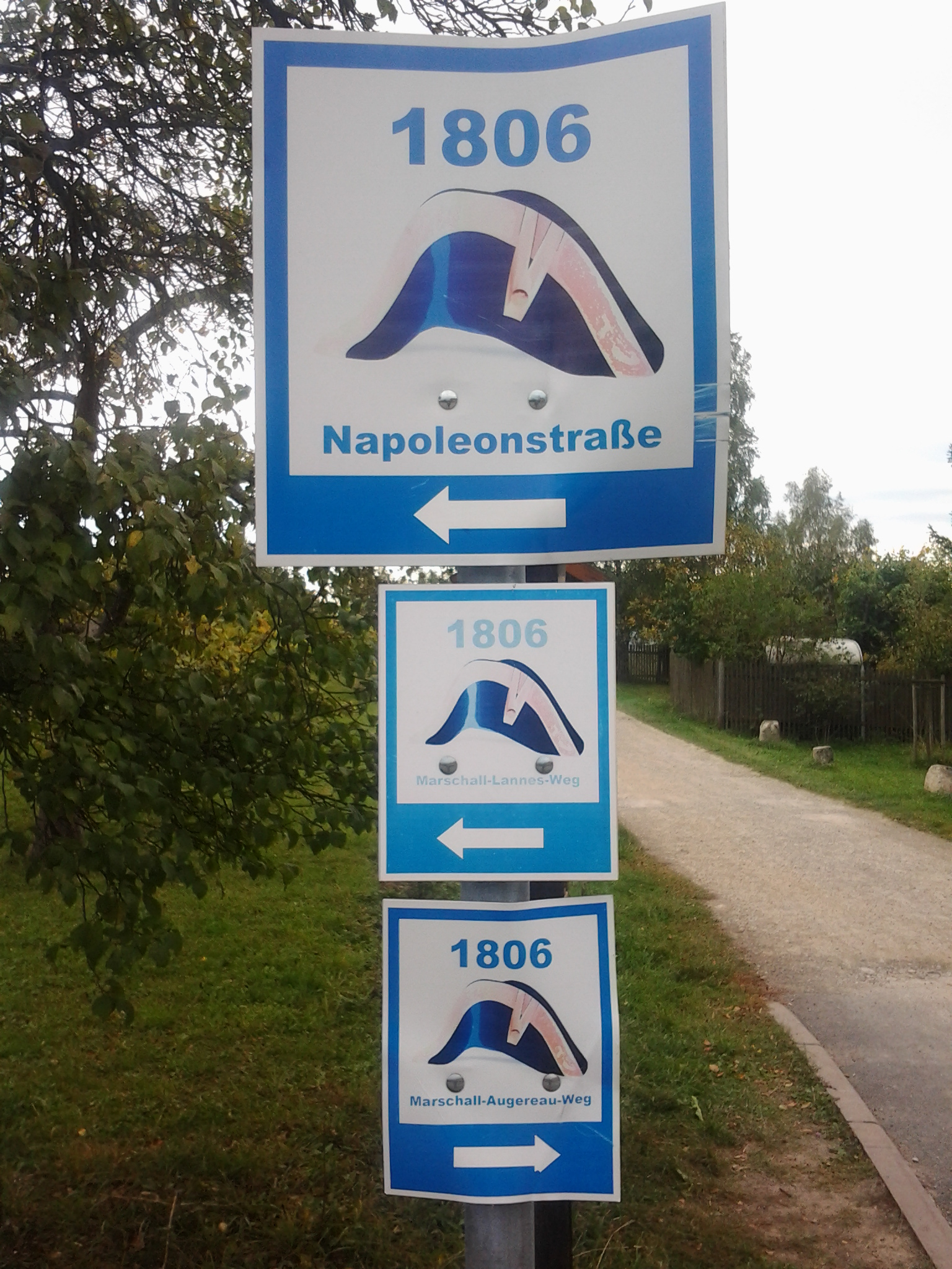 3 Wegweiser von Straßen und Wanderwegen in der Nähe von Jena, die nach Napoleon und 2 seiner Marschälle benannt sind